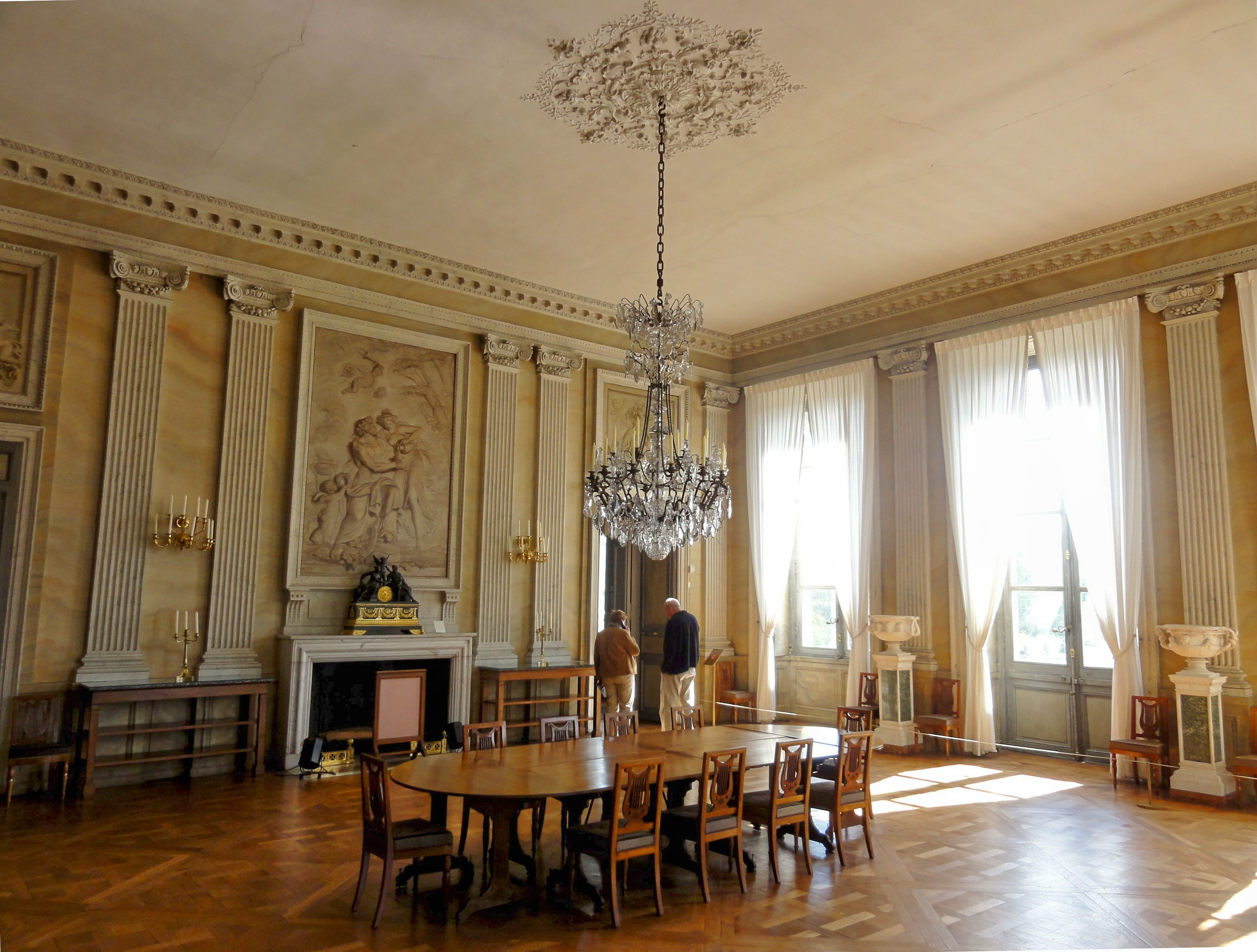 Salle à manger de l'Empereur.